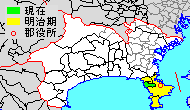 Map of Miura District, Kanagawa, Japan